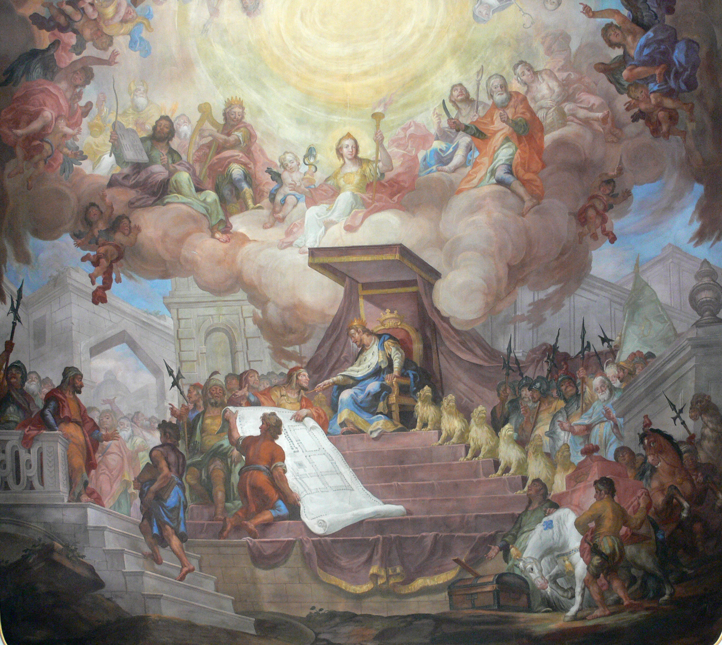 Bad Wurzach, Pfarrkirche St. Verena, Deckenfresko im Mittelschiff von Andreas Brugger Westteil, König Salomo lässt sich den Plan des Tempels erklären